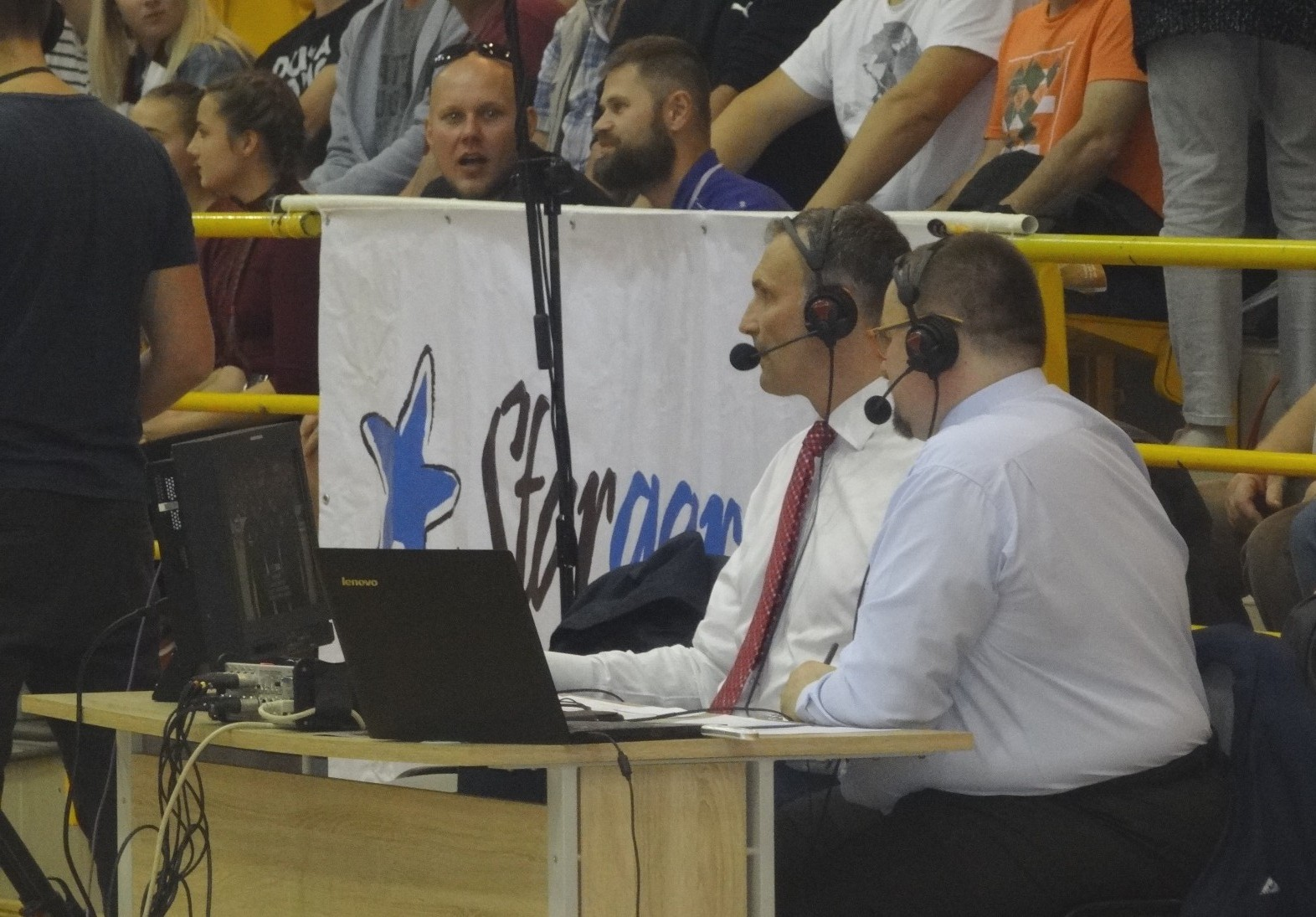 Redaktorzy Polsatu (06.10.2018)